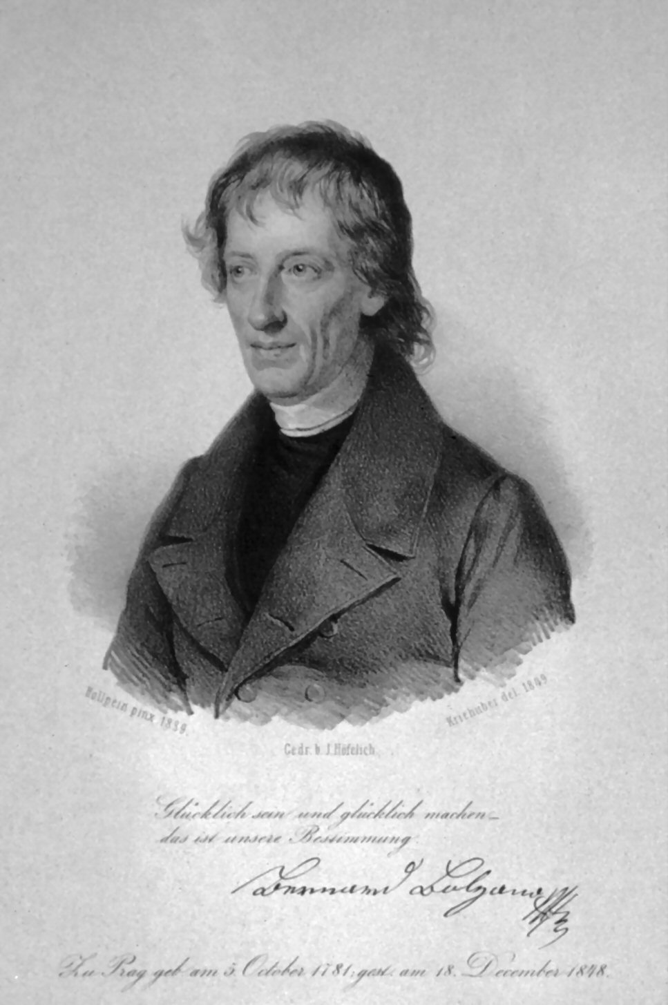 Bernard Bolzano, Lithographie von Josef Kriehuber (1849) nach einem Gemälde von Heinrich Hollpein aus dem Jahre 1839